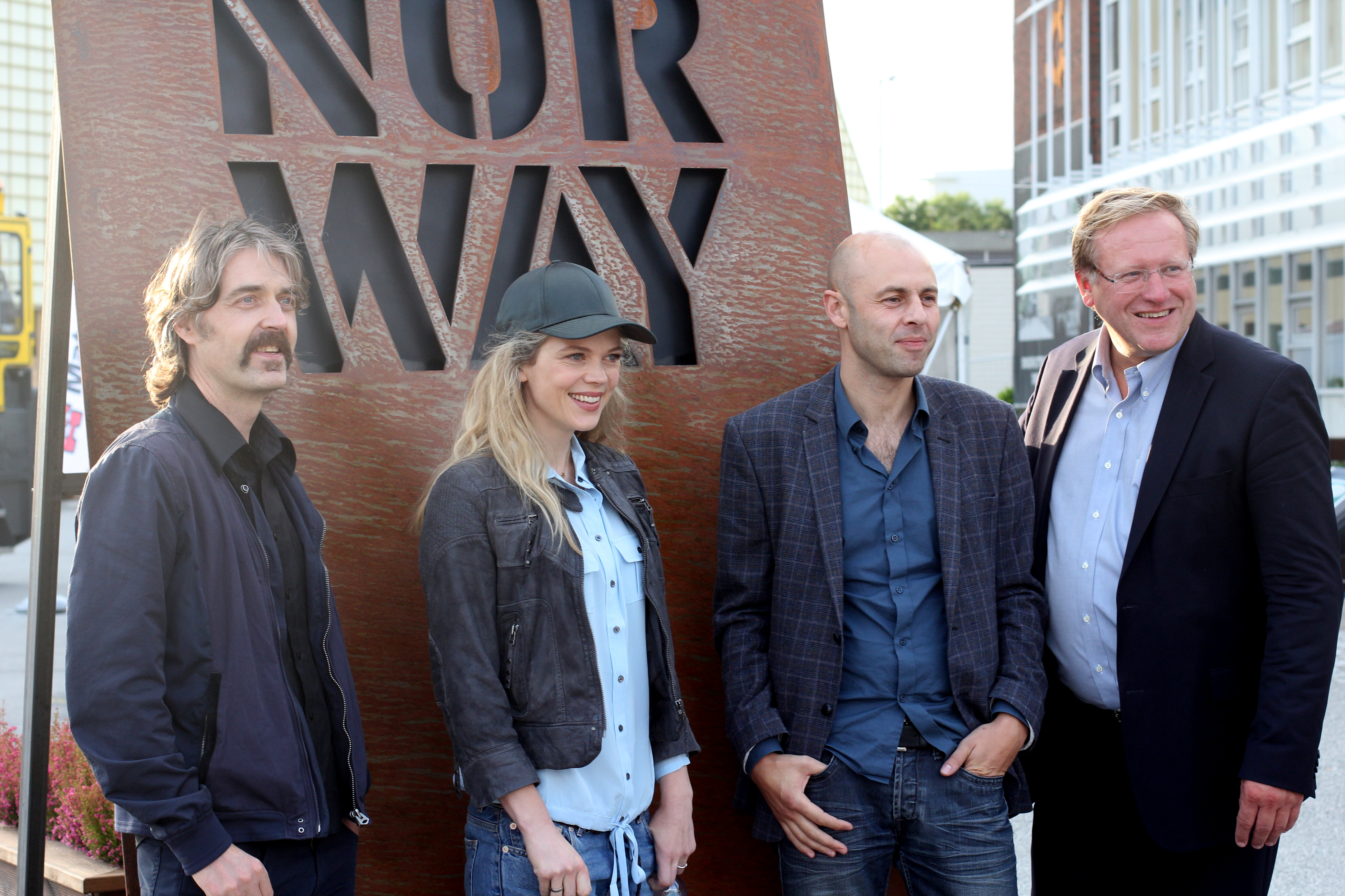 Erik_Skjoldbjærg,_Ane_Dahl_Torp,_Christian_Fredrik_Martin,_Leif_Johan_Sevland i forbindelse med førpremieren på filmen Pioner på ONS Norway 2013